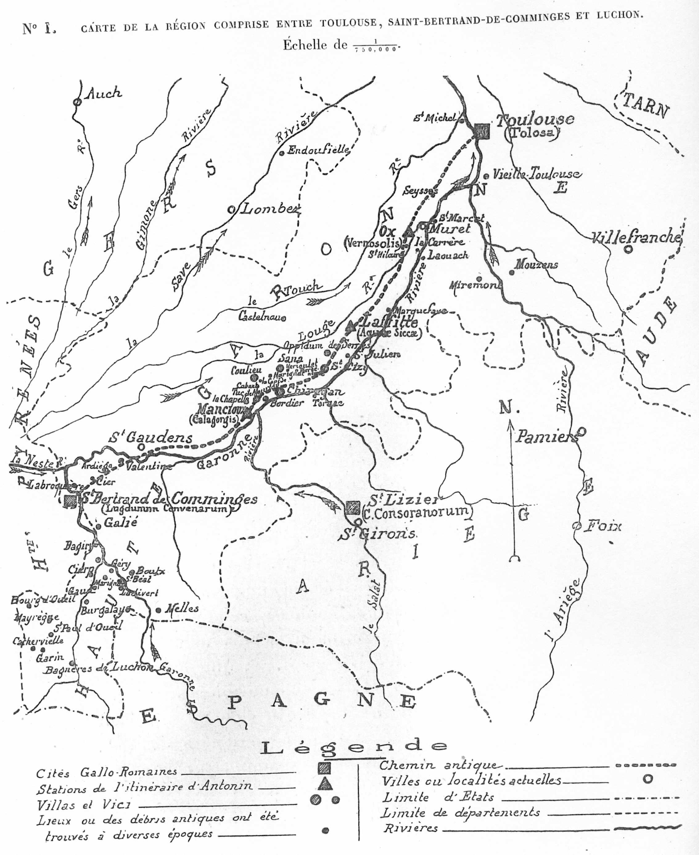 Carte de la région de Chiragan